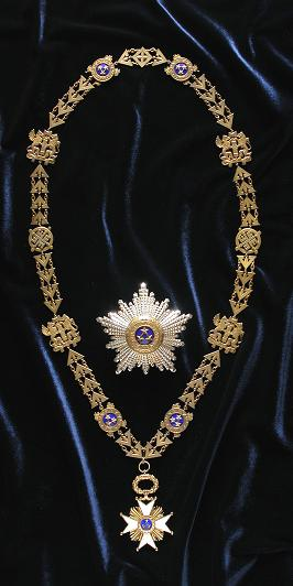 Latvian order Three-Star Order (Triju Zvaigžņu ordenis) - obverse